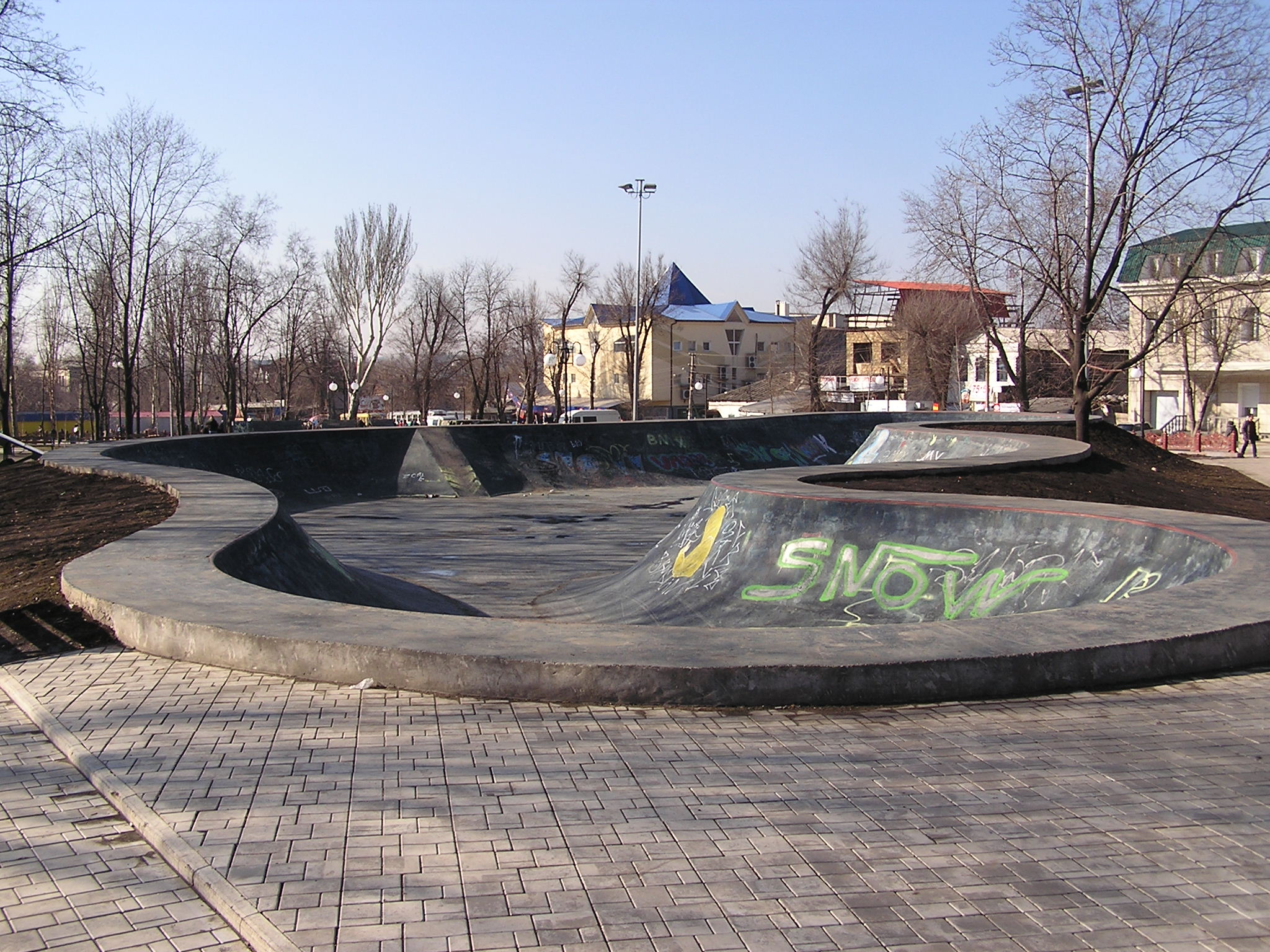 Донецк. Сквер Сокол